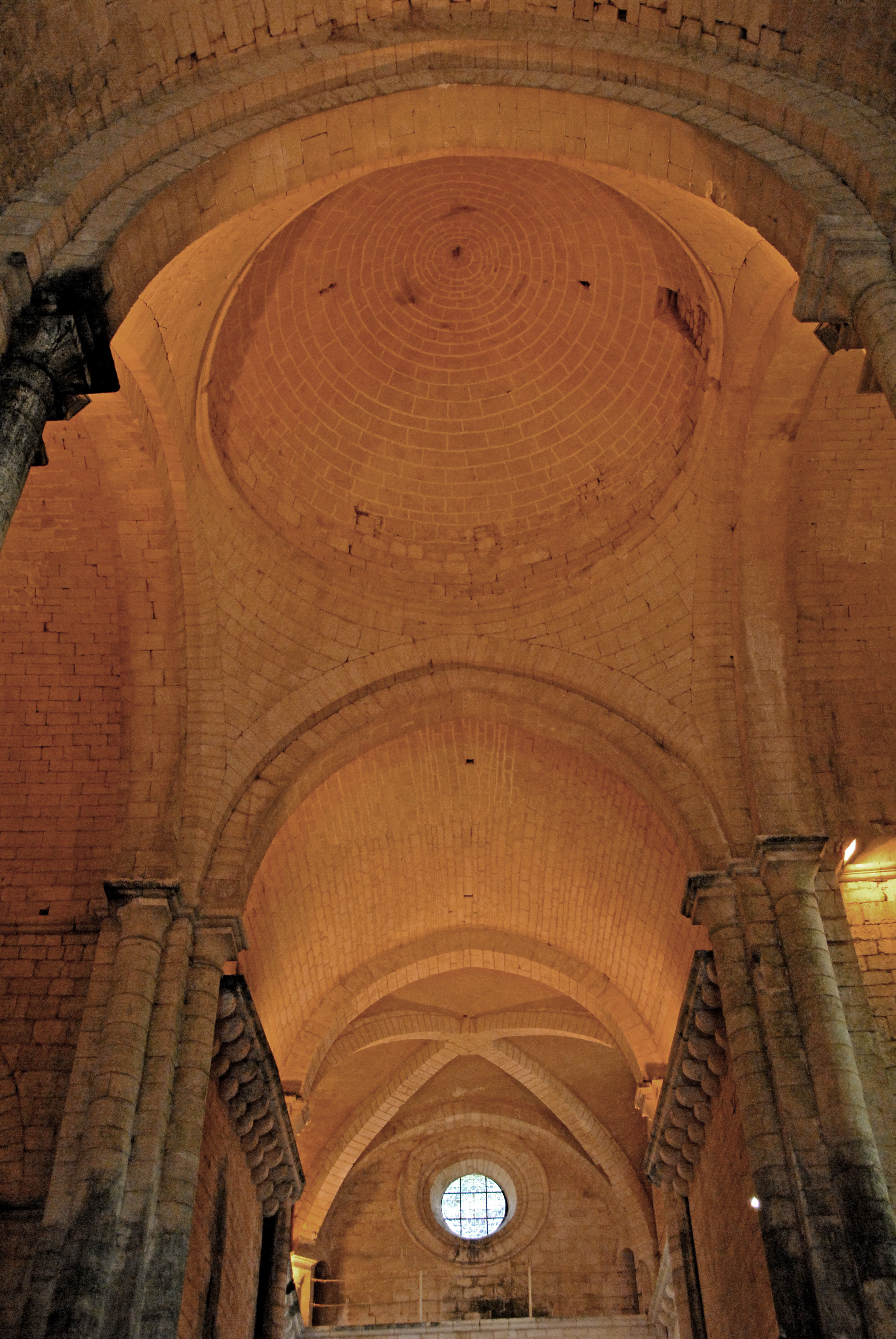 Saint-Amand-de-Coly, Vierunmgskuppel und Chorgewölbe